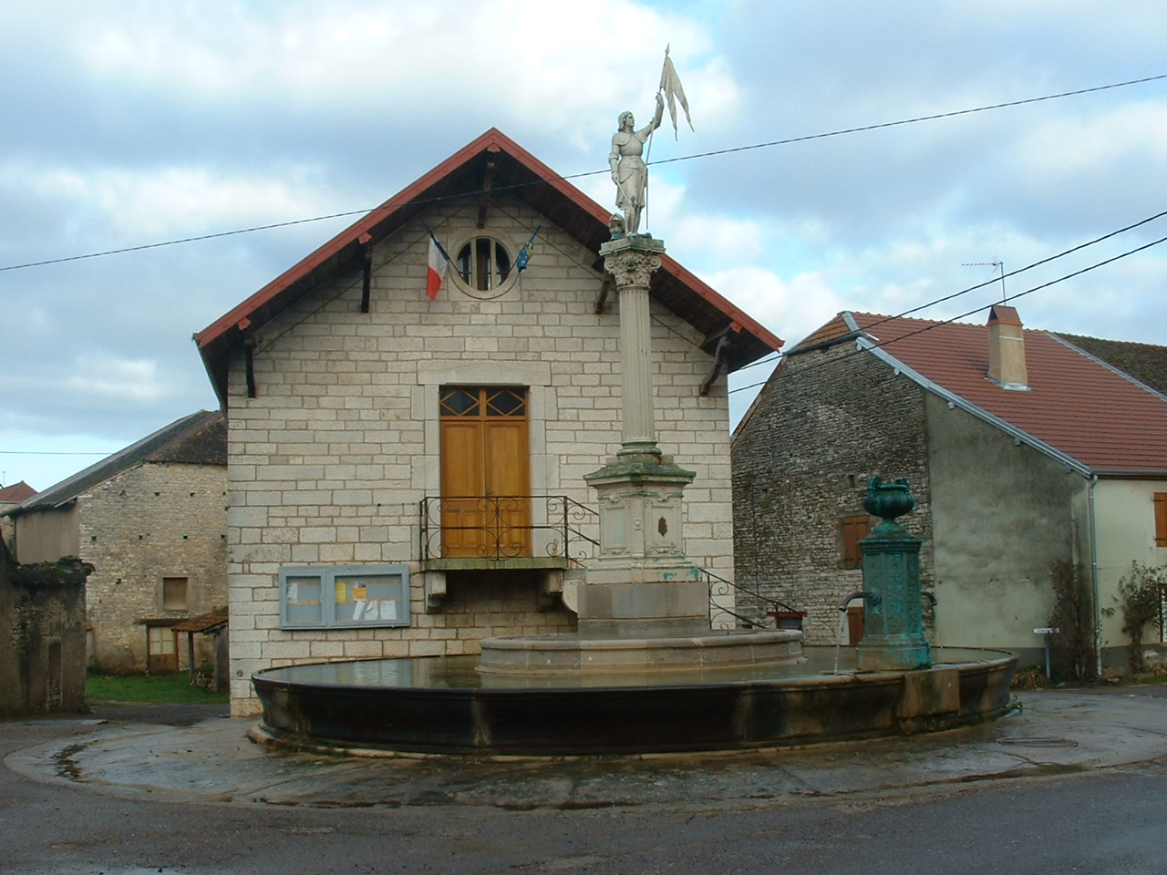 mairie de Vantoux-et-Longevelle auteur Jéremy Chausse